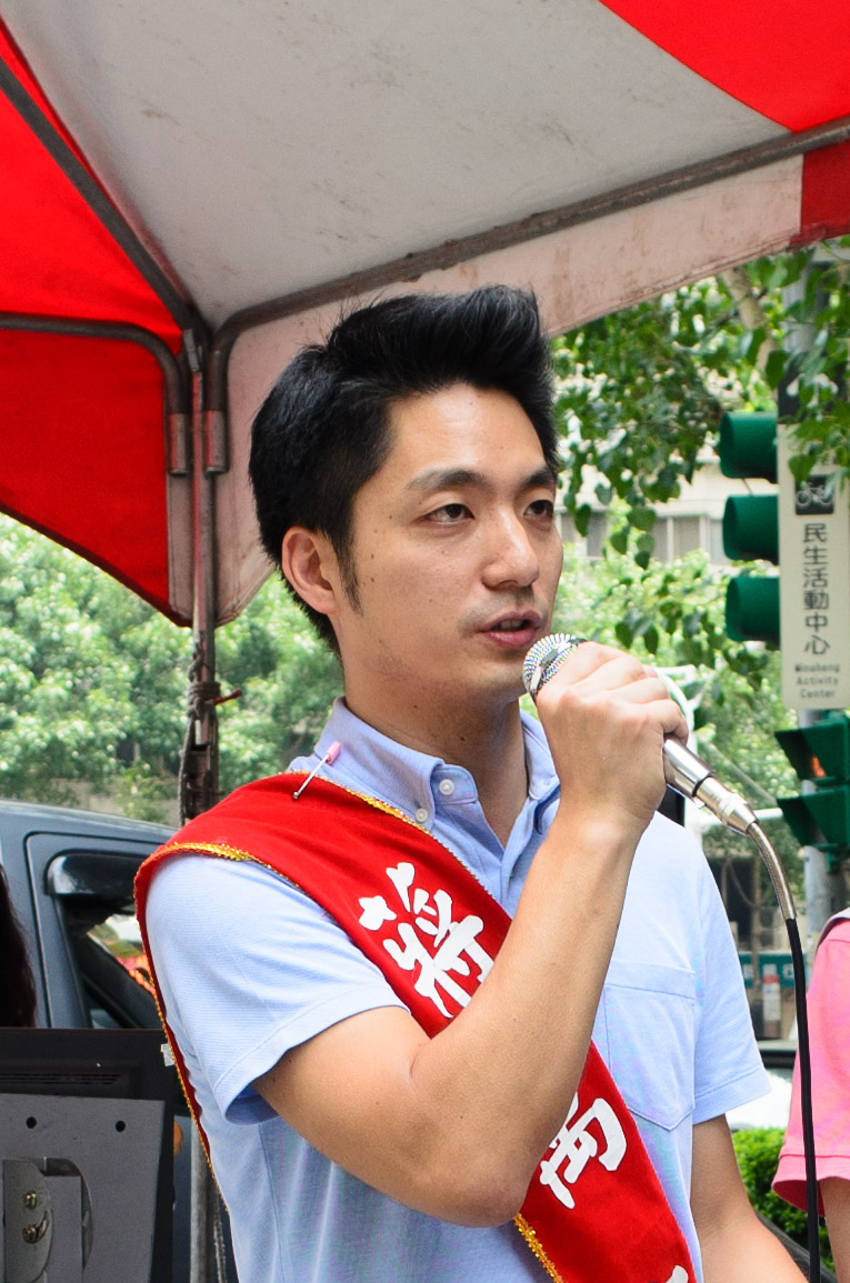 國民黨立法委員參選人蔣萬安，攝於2015年臺北市松山區富泰里端午節活動。